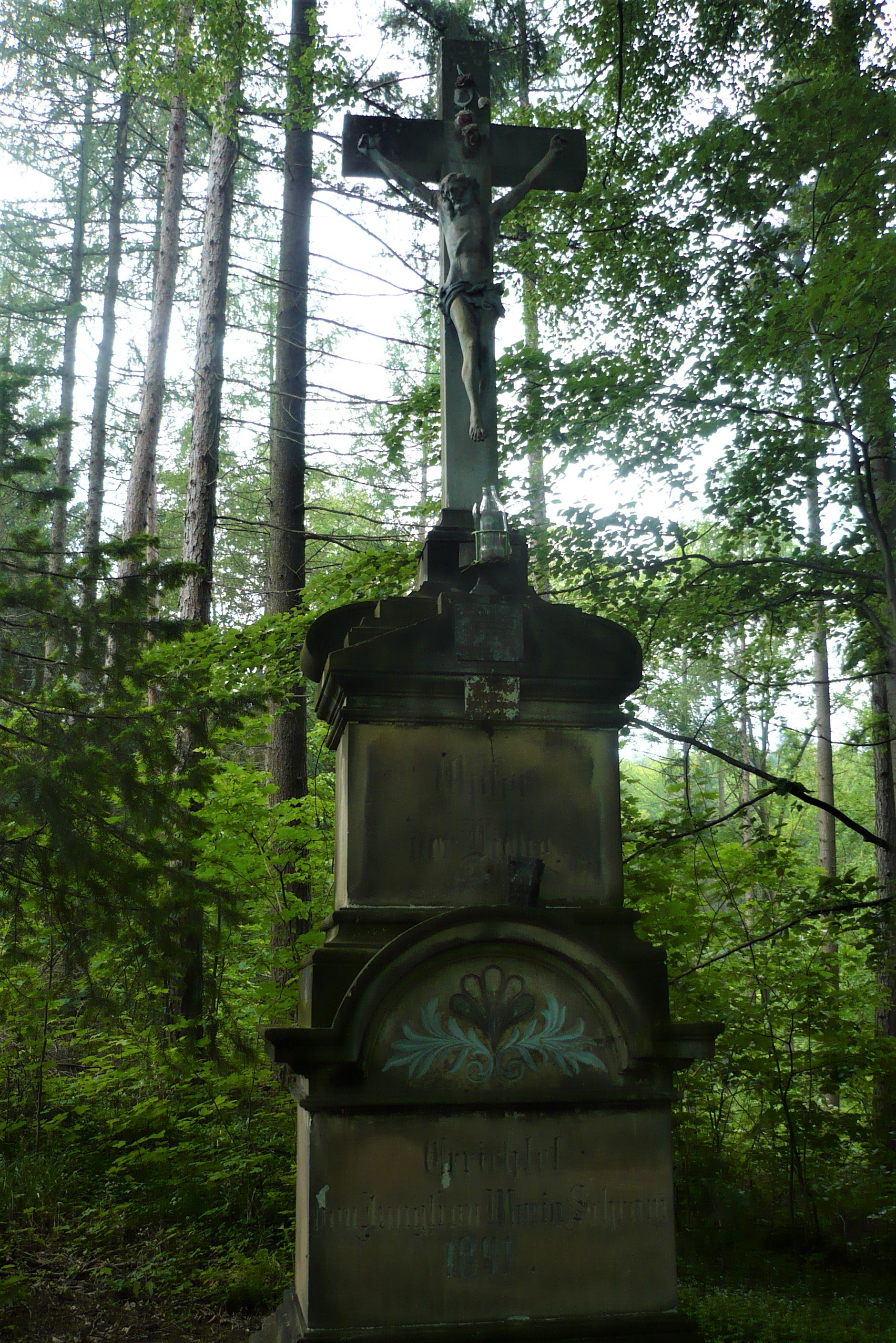 Złoty Stok